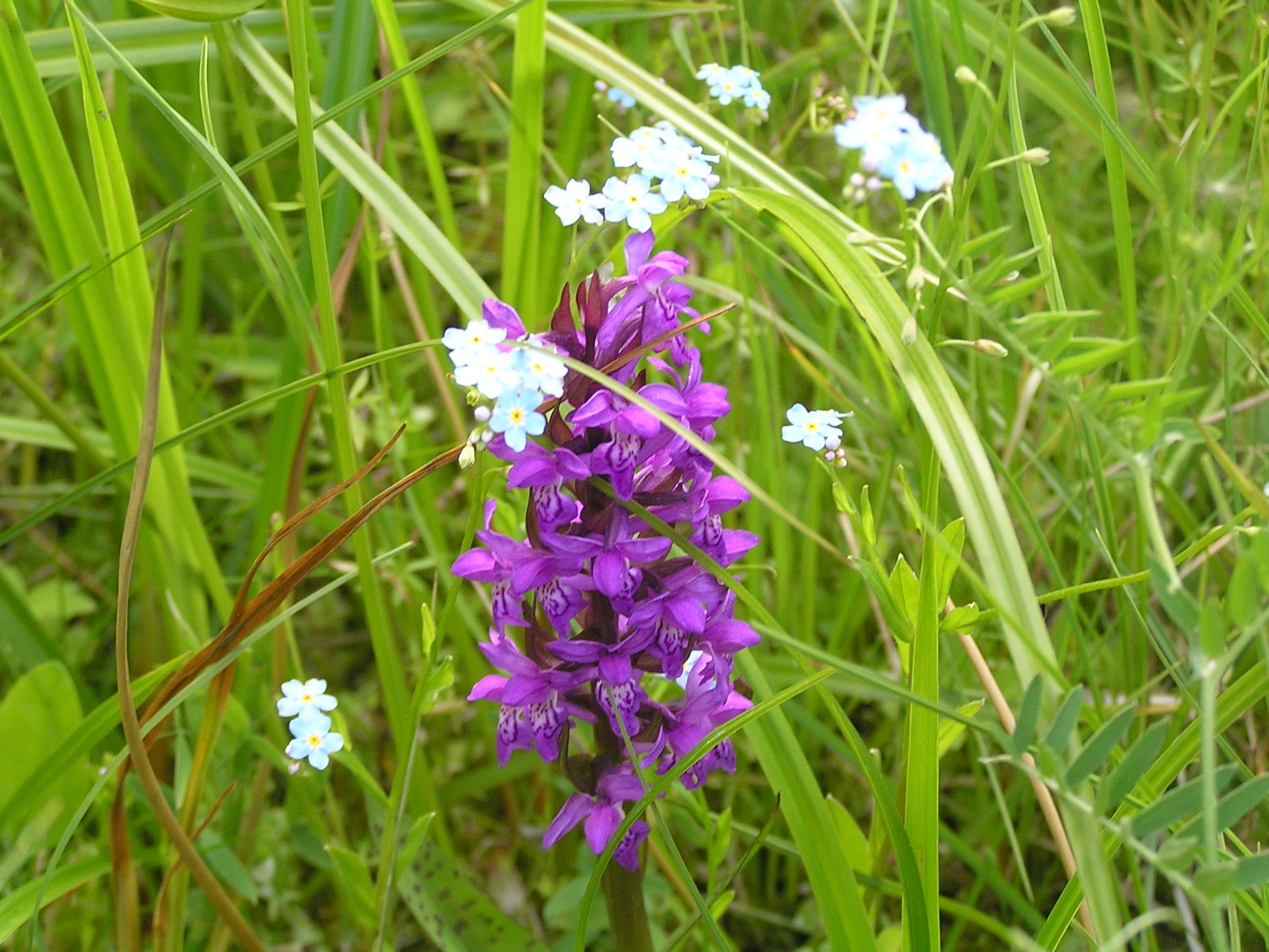 Prstnatec májový na území PP Žďár u Chodského Újezda